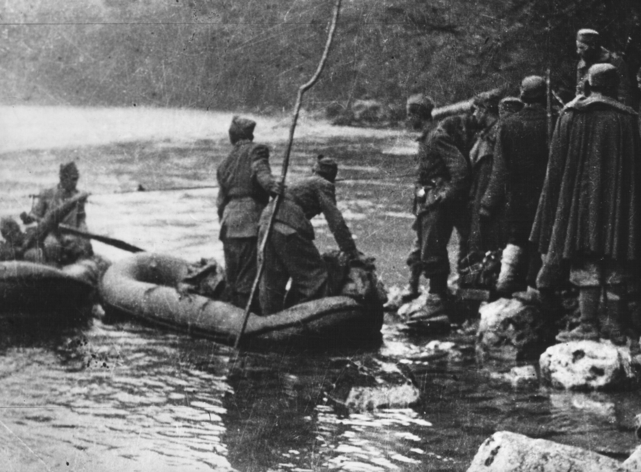 Partigiani della Seconda brigata d'assalto proletaria sulla Sutjeska